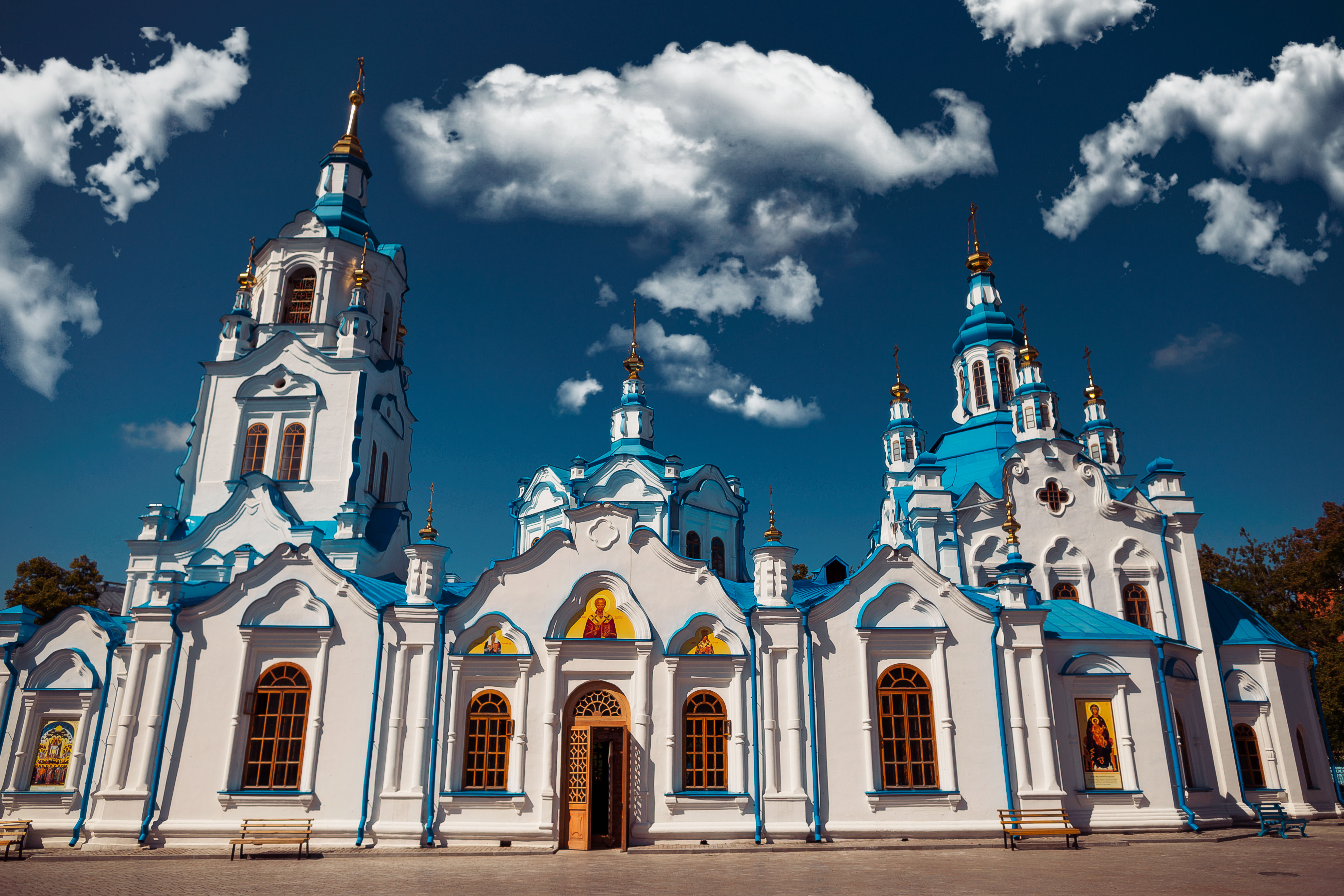 Собор Знамения (Тюменская область, Тюмень, Семакова улица, 13)